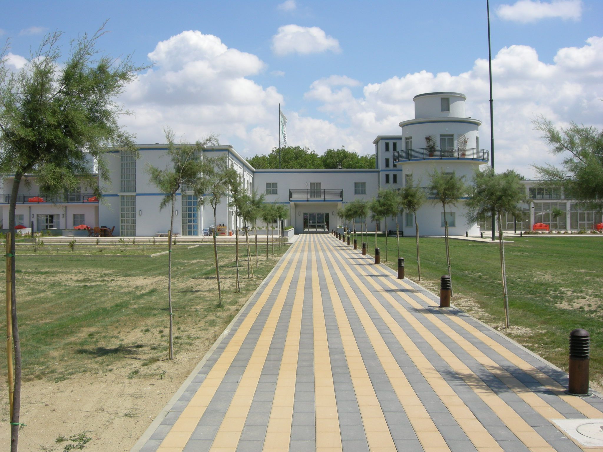 Ex colonia dei Fasci Italiani all'Estero